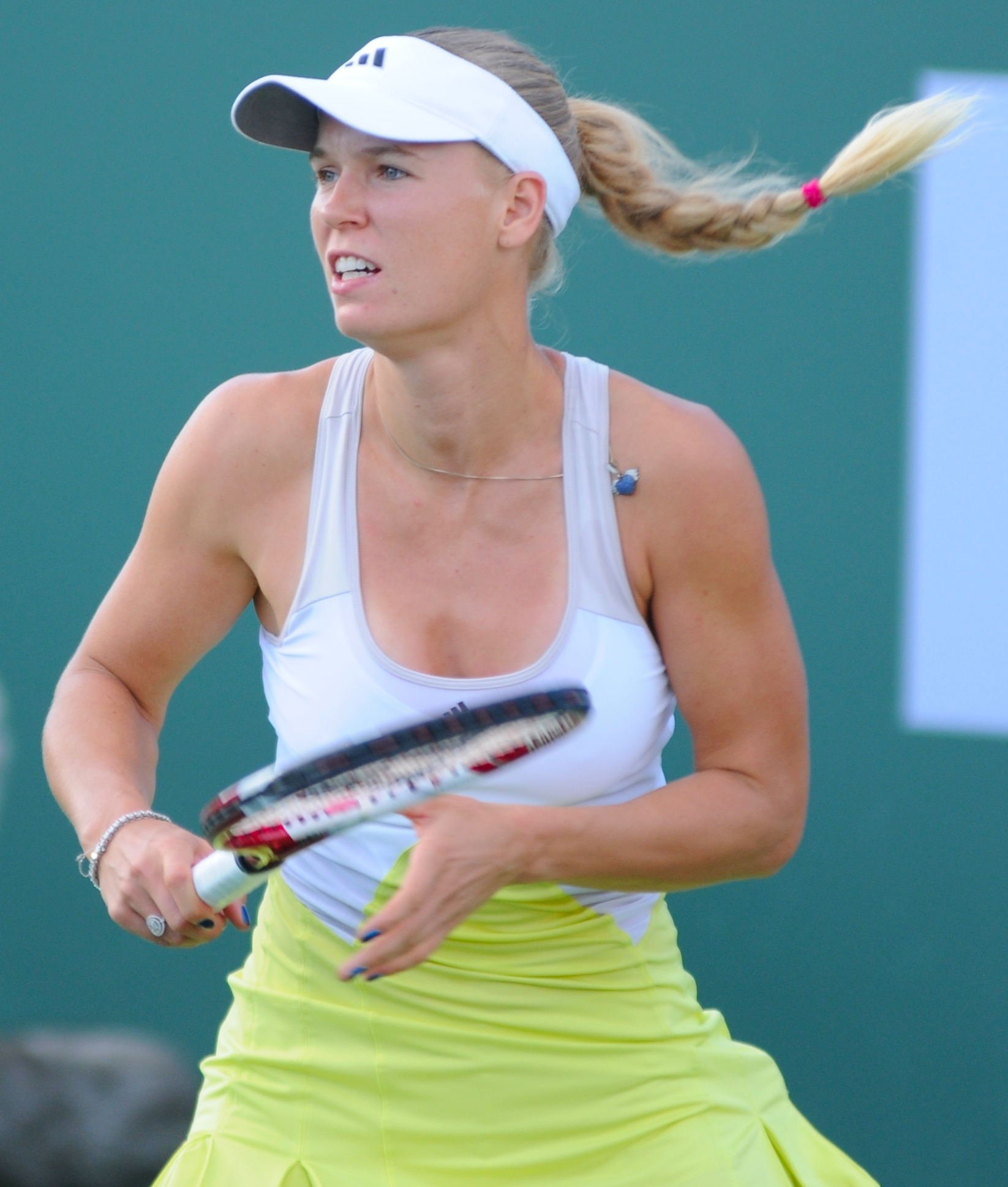 2013 BNP Paribas Open